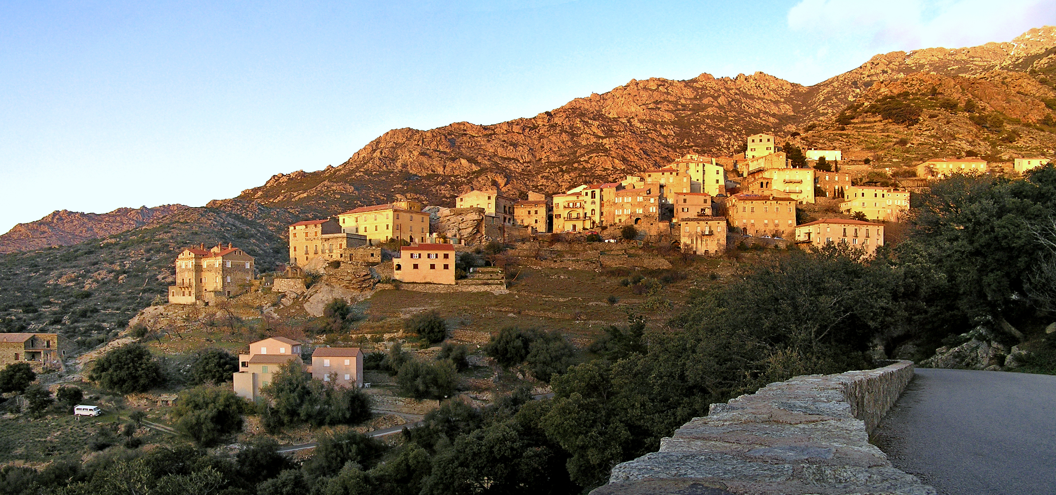 Lama (Corse) - Panorama du village